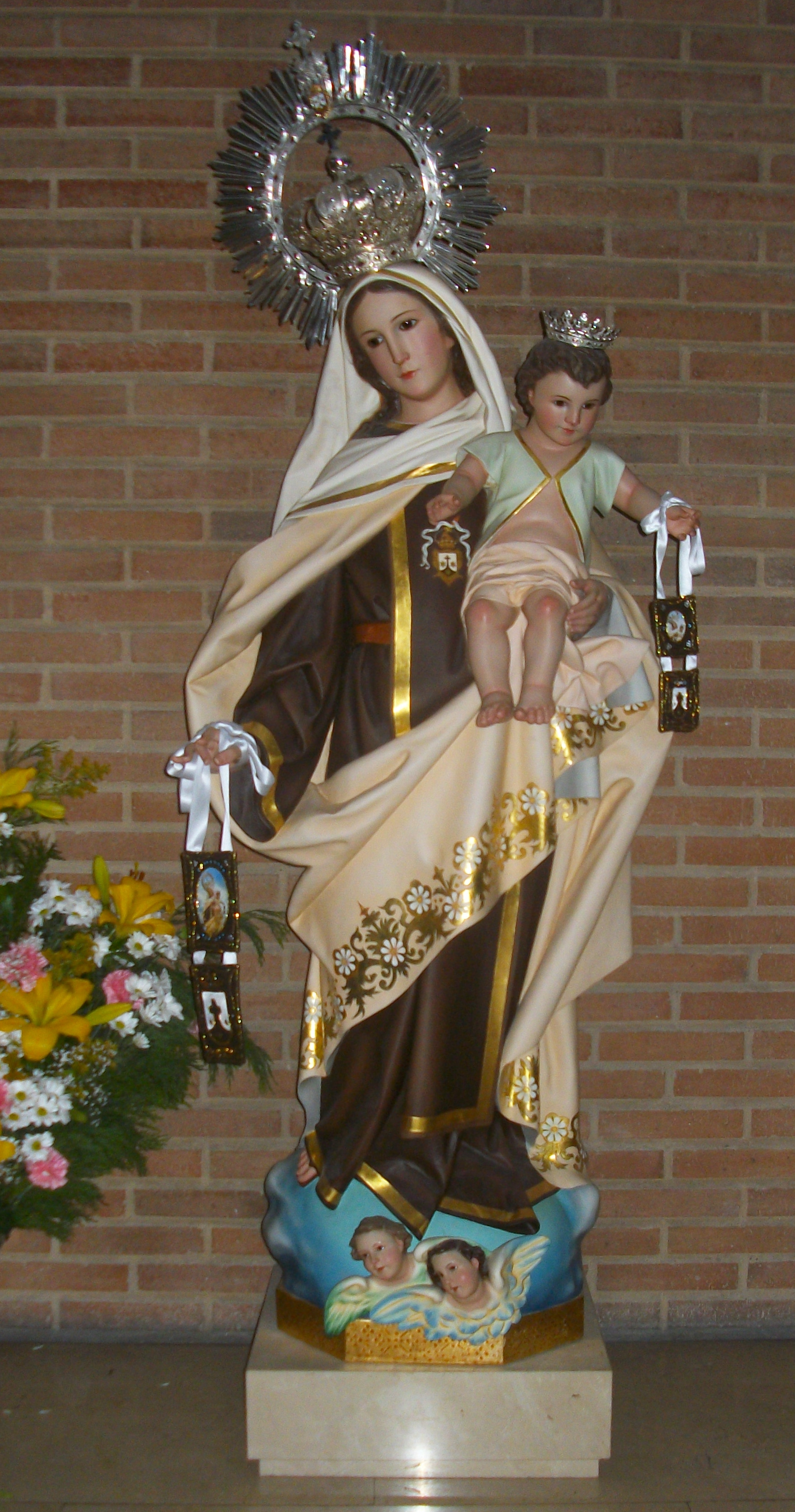 Statue de Notre-Dame du Mont Carmel dans le couvent des Carmes de Gijon (Espagne)